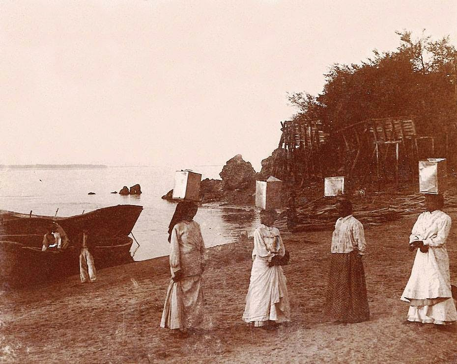 esclavos en argenitina